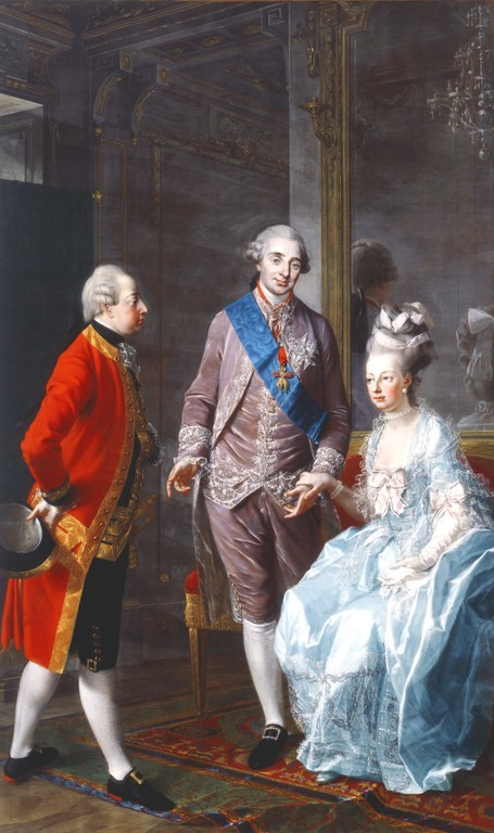 Marie Antoinette, Erzherzog Maximilian und Ludwig XVI.title QS:P1476,de:"Marie Antoinette, Erzherzog Maximilian und Ludwig XVI." label QS:Lde,"Marie Antoinette, Erzherzog Maximilian und Ludwig XVI."